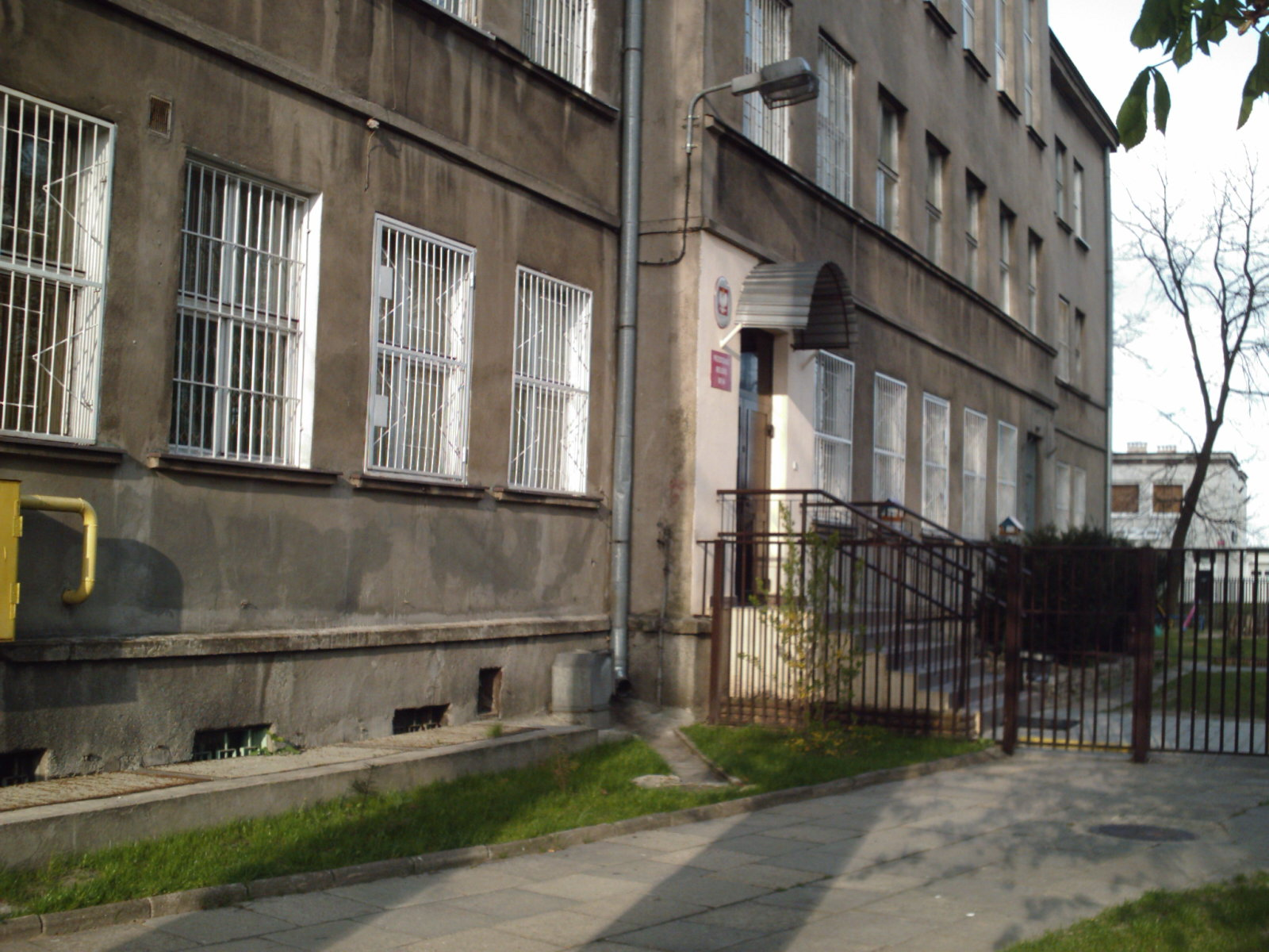 Przedszkole Miejskie nr 94 w Łodzi / Tyły Publicznego Gimnazjum nr 33 w Łodzi